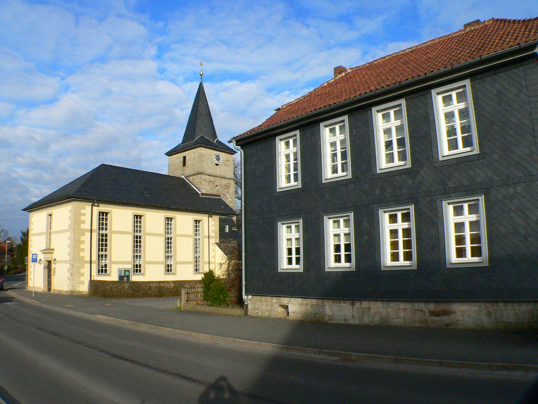 Coburg Stadtteil Scheuerfeld, Kirche und alte Schule